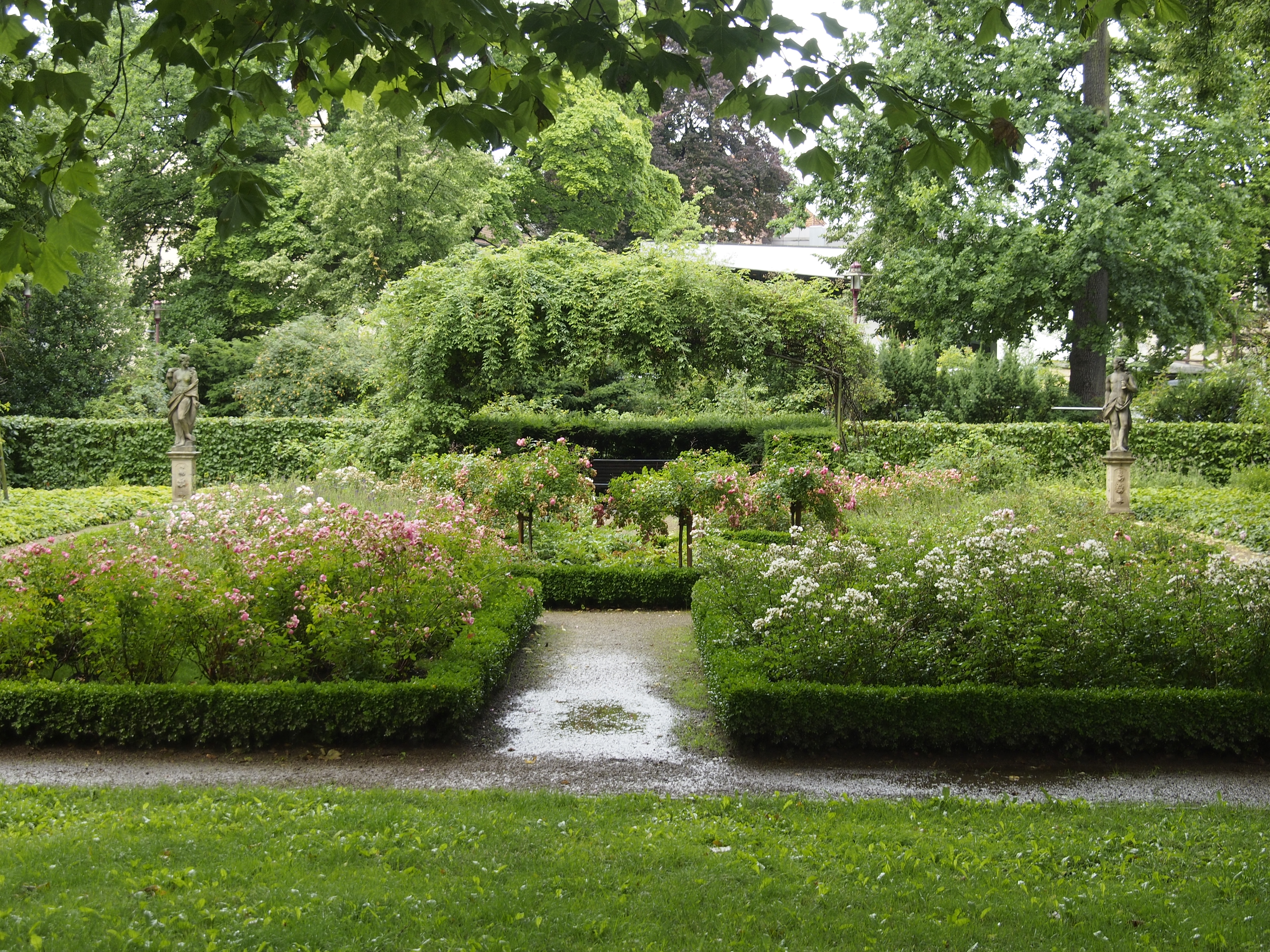 Barocker Rosengarten im Französischen Garten in Celle (Niedersachsen)